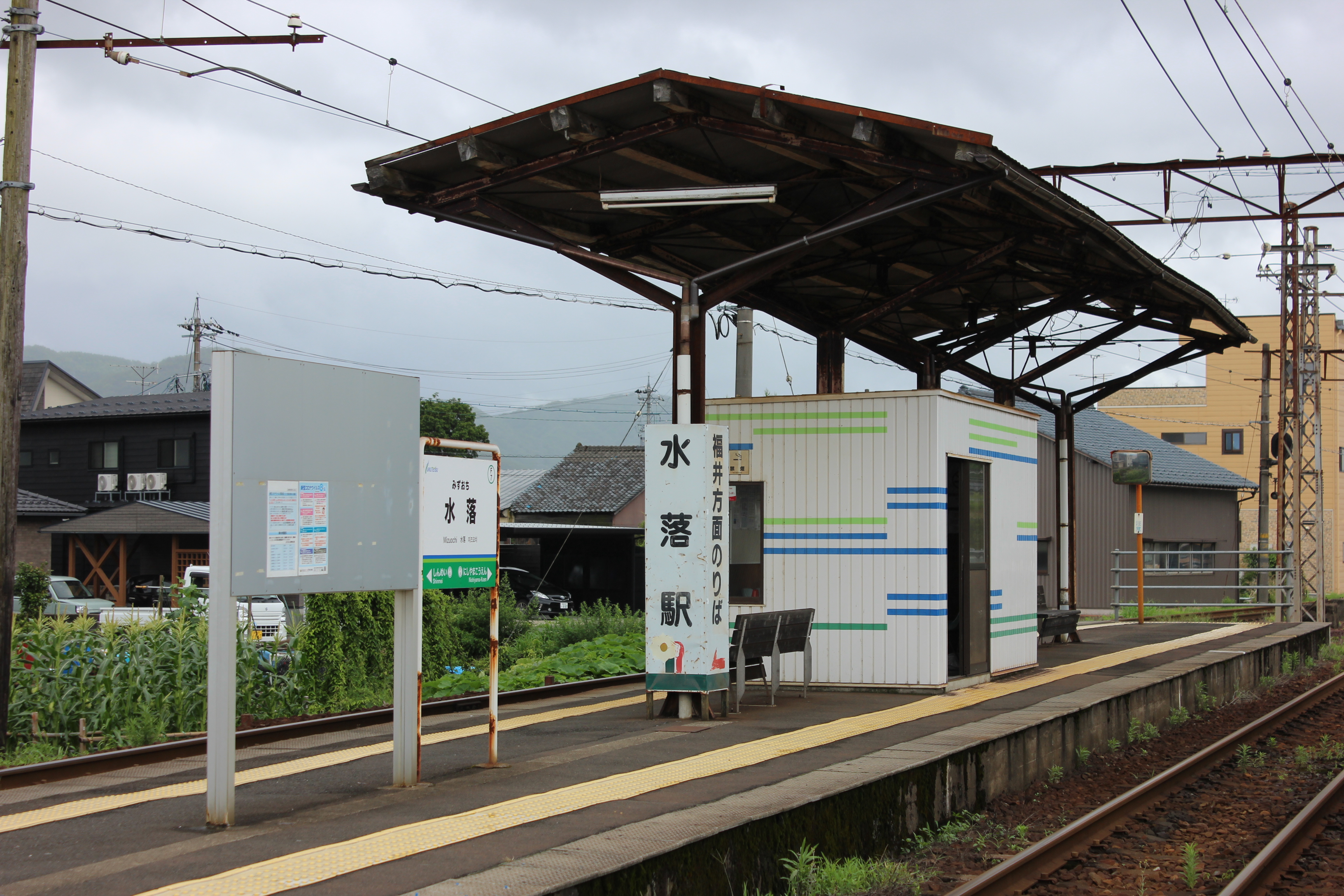 水落駅（福井県鯖江市） Canon EOS Kiss X5